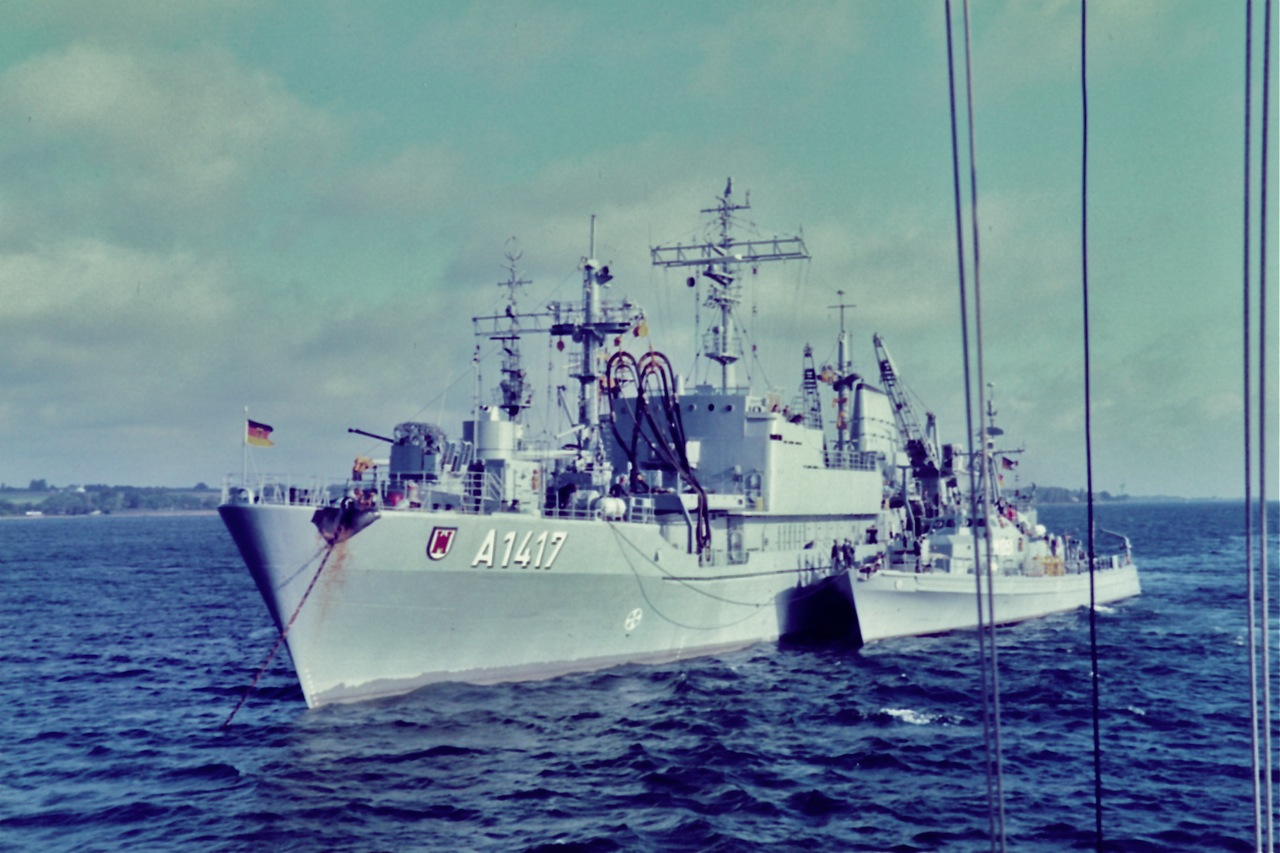 FGS Offenburg (A 1417) versorgt FGS Schütze (M 1062) des 1. Minensuchgeschwaders vor Langeland währed des NATO-Manövers BLUE HARRIER im September 1983